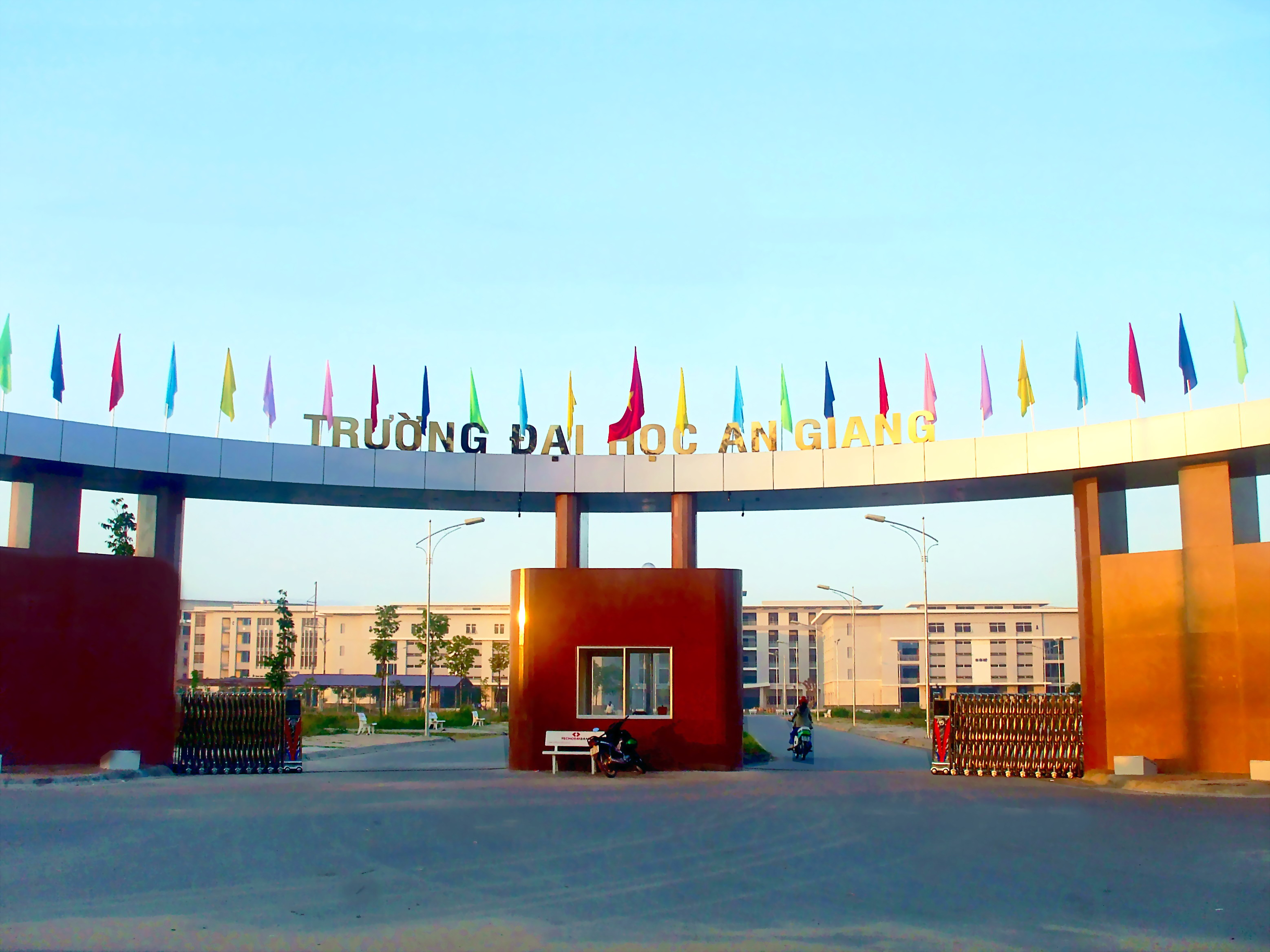 Đại học An Giang (khu mới) nằm trên địa bàn phường Đông Xuyên, thuộc thành phố Long Xuyên, tỉnh An Giang, Việt Nam.